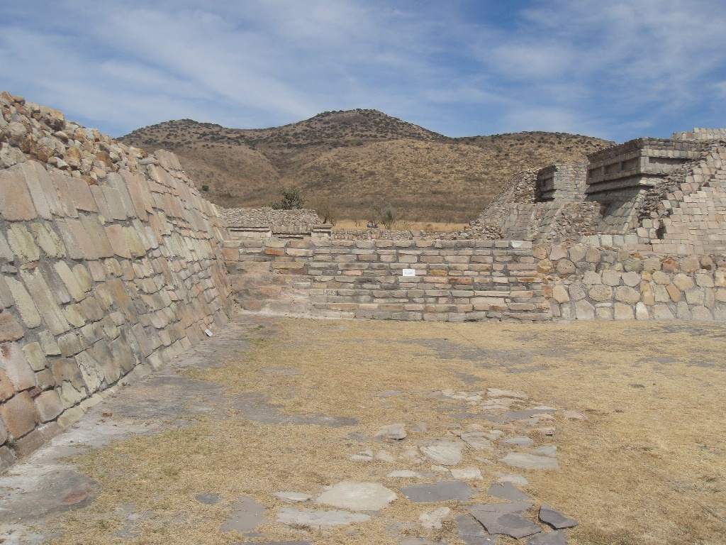 Template:Plazuelas, casas tapadas south entrance